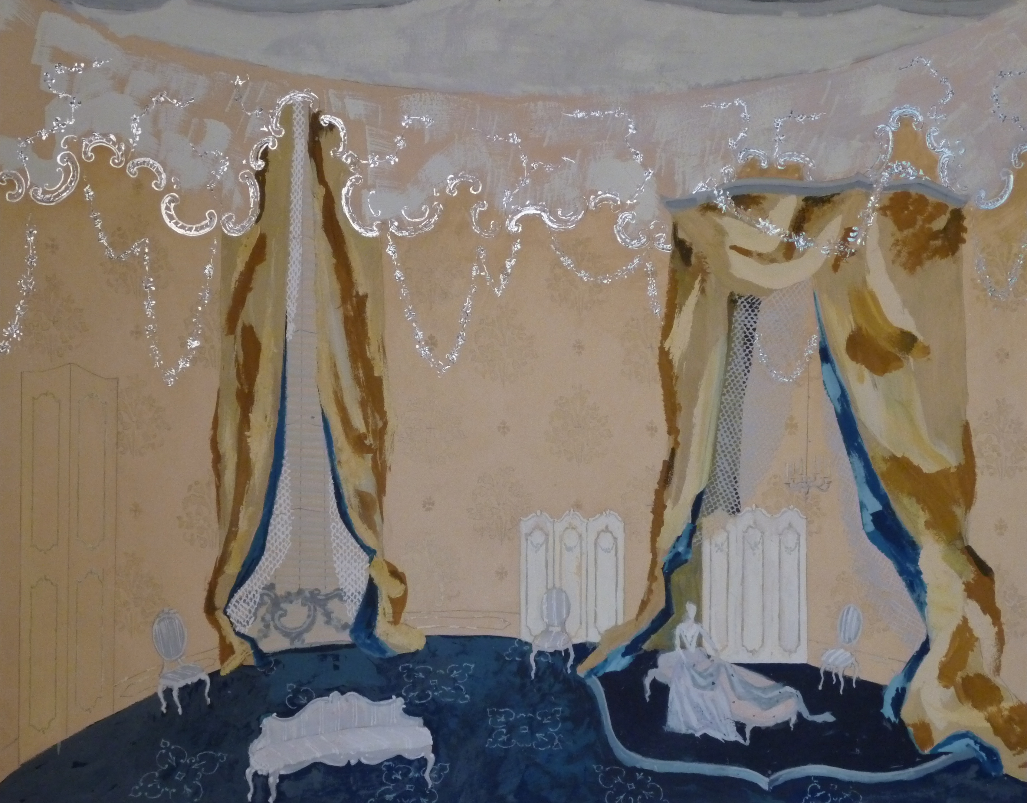 Bühnenbildentwurf von Helmut Jürgens für "Rosenkavalier" von R. Strauss, 1. Akt, Aufführung München 1962